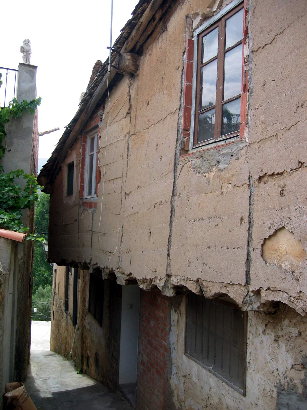 Detalle de arquitectura tradicional (vernacular) en Casasaltas (Valencia), año 2003.